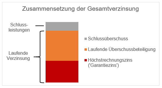 Schematische Darstellung der Gesamtverzinsung im Rahmen der Überschussbeteiligung deutscher Lebensversicherungsunternehmen